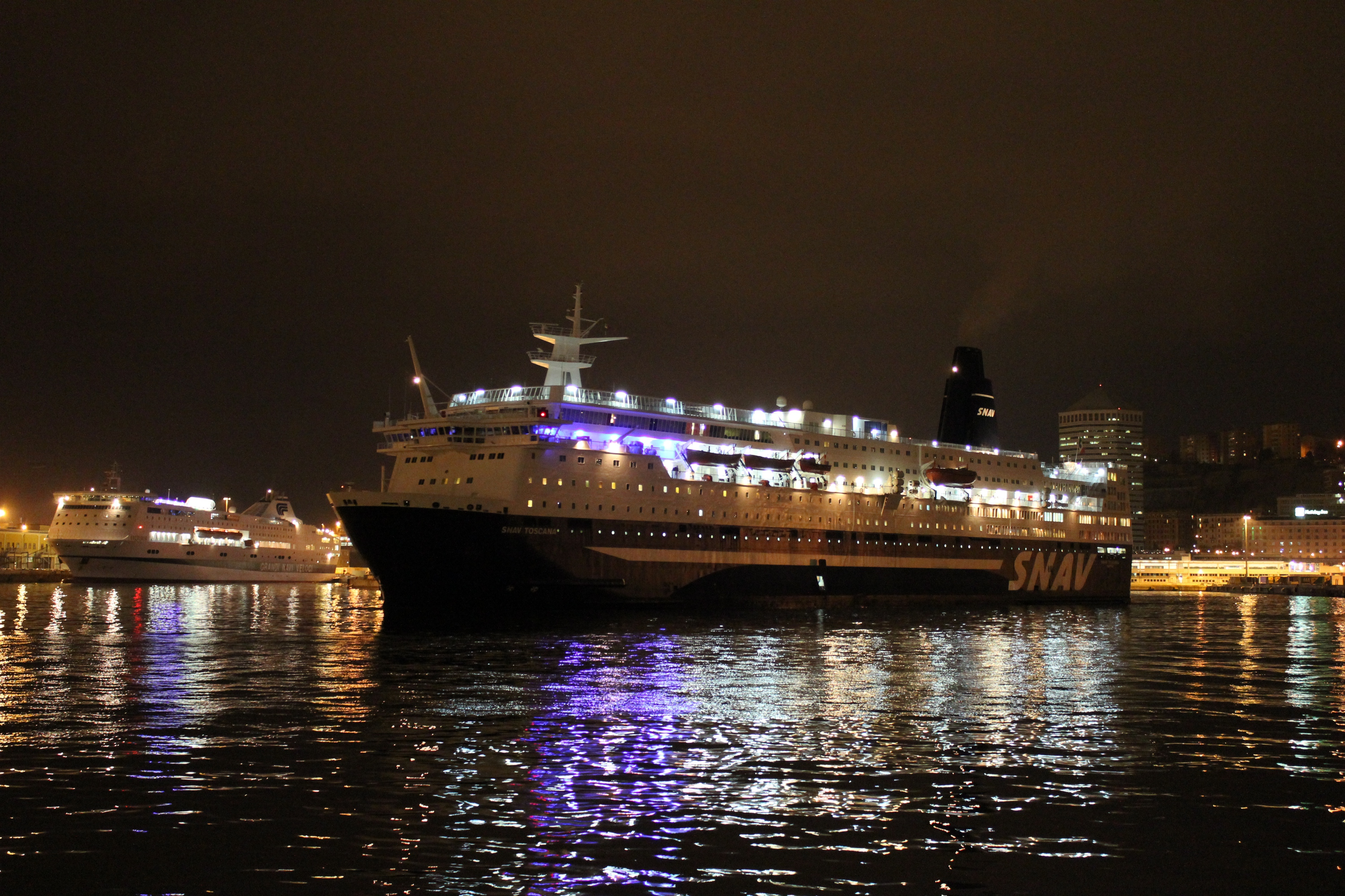 traghetto SNAV Toscana in partenza da Genova